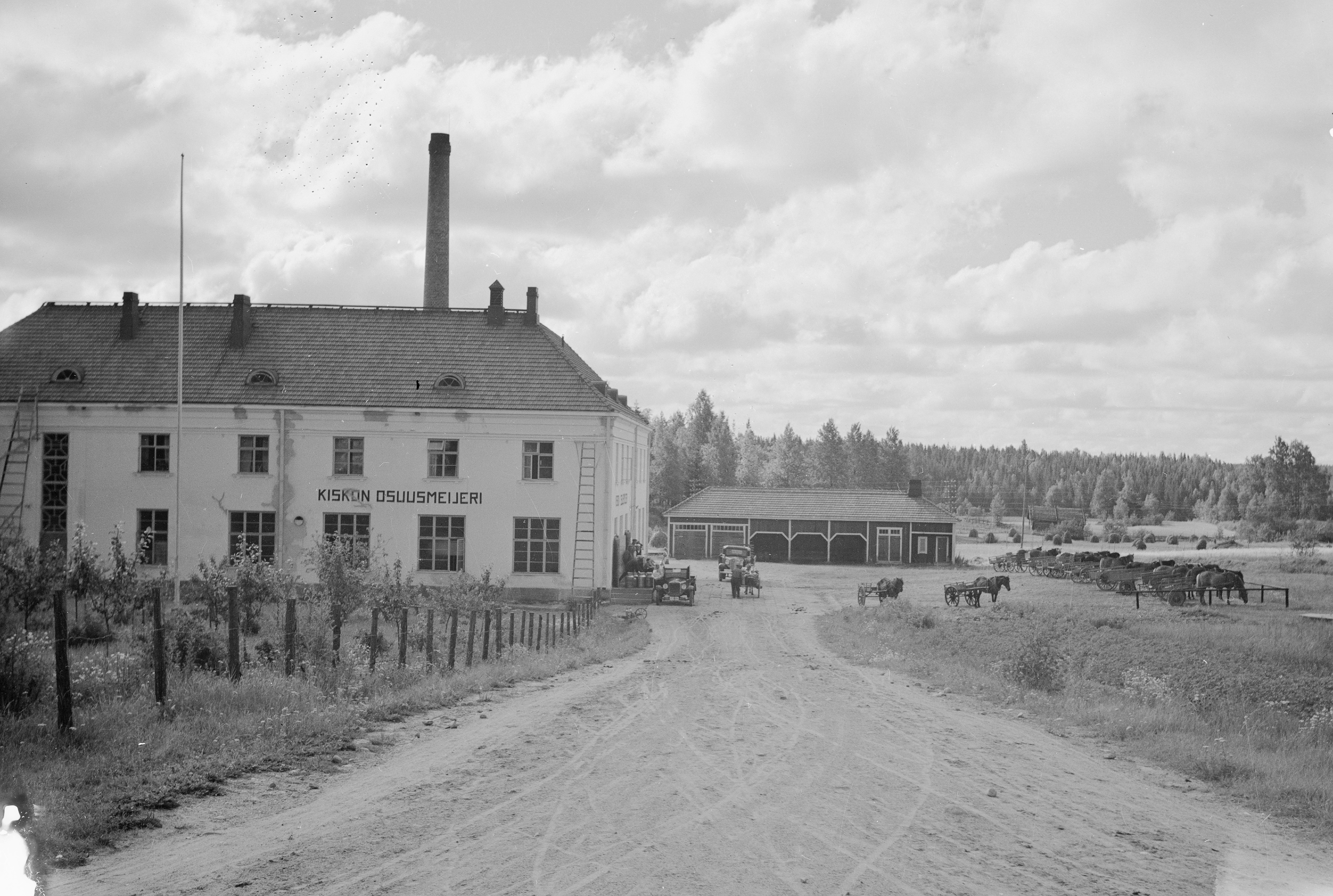 Kiskon osuusmeijeri, Kisko TlHK19670603 27635(1)